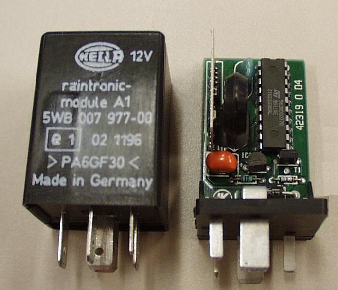 Typische Relais im Auto. Links: Regensensor-Relais, Rechts geöffnet: Ein EGR-Relais